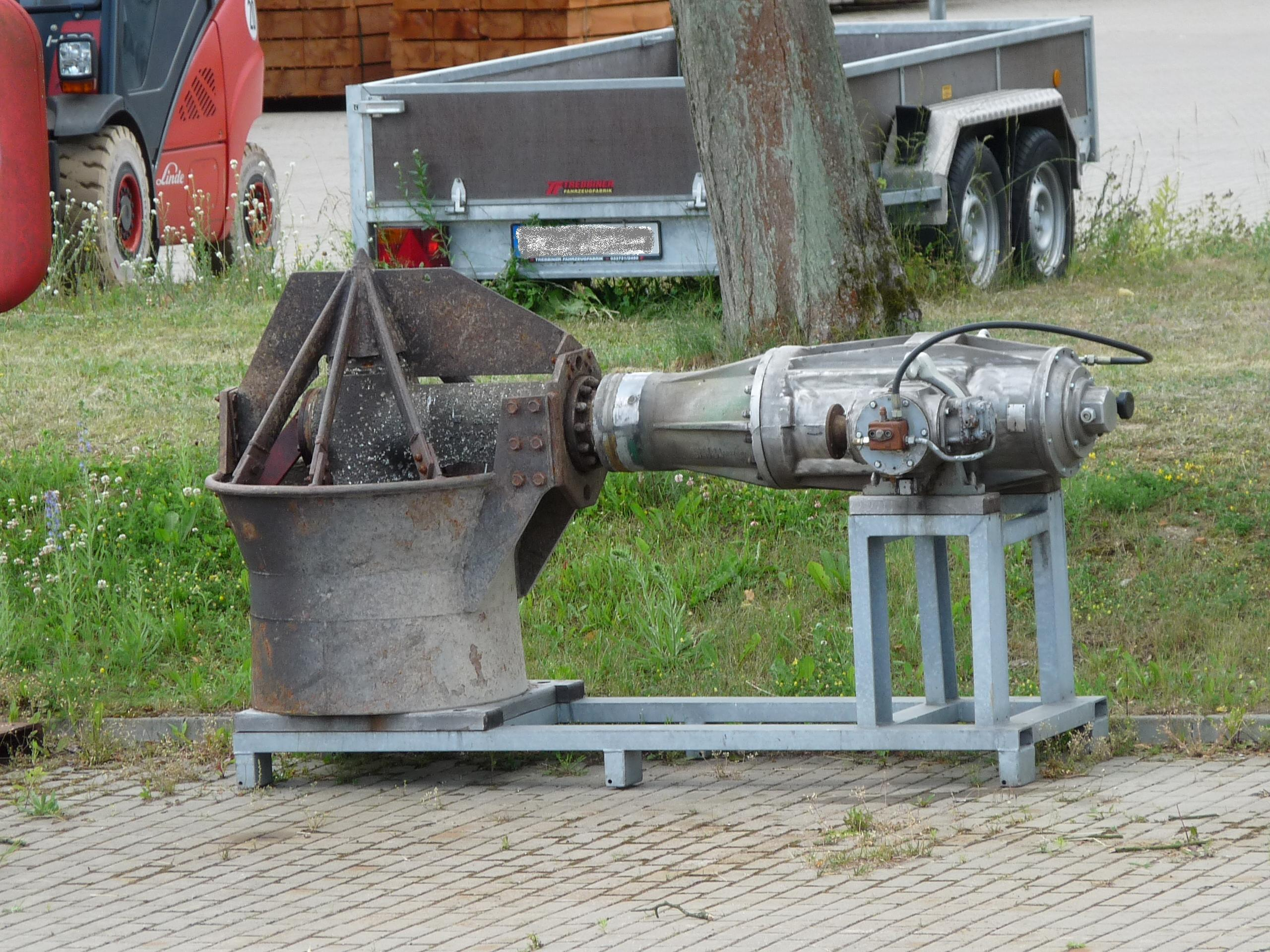 Abgelegter Z-Antrieb. Dieser Z-Antrieb findet Verwendung bei Schubbooten aus DDR-Produktion.